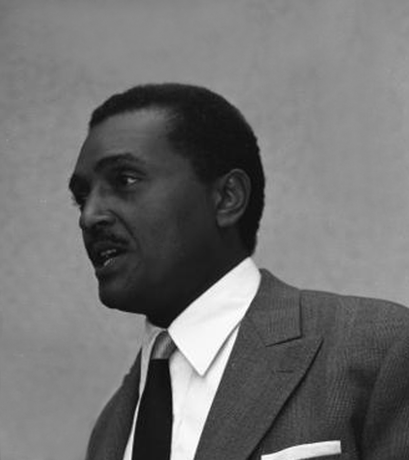 Title: Bonn, Empfang für Aussenminister von Gabun People in the image: Aubame, Jean Hilaire: Außenminister, Oppositionsführer, Gabun Scheel, Walter: Bundespräsident, Außenminister, Bundesminister für wirtschaftliche Zusammenarbeit, FDP, Bundesrepublik Deutschland (GND 118606751) Factual corrections and alternative descriptions are encouraged separately from the original description. Additionally errors can be reported at this page to inform the Bundesarchiv. Original historic description: Besuch des Außenminister von Gabun, Jean Hilaire Aubamé und Wirtschaftsminister Gustave Auguilé, Empfang durch BM Scheel im Königshof, Bonn